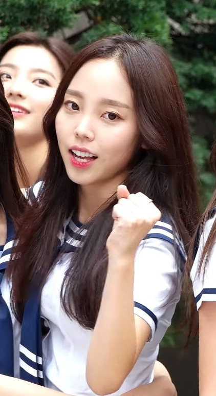 170712 홍대 걷고 싶은 거리 - 아이돌학교 퇴근